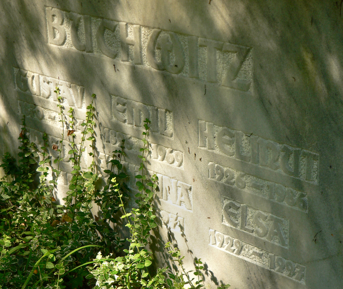 Elsa Buchwitz Gemeinschaftsgrab